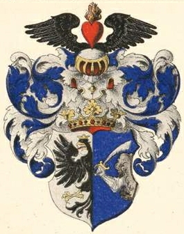 Šerebtsovi suguvõsa aadlivapp